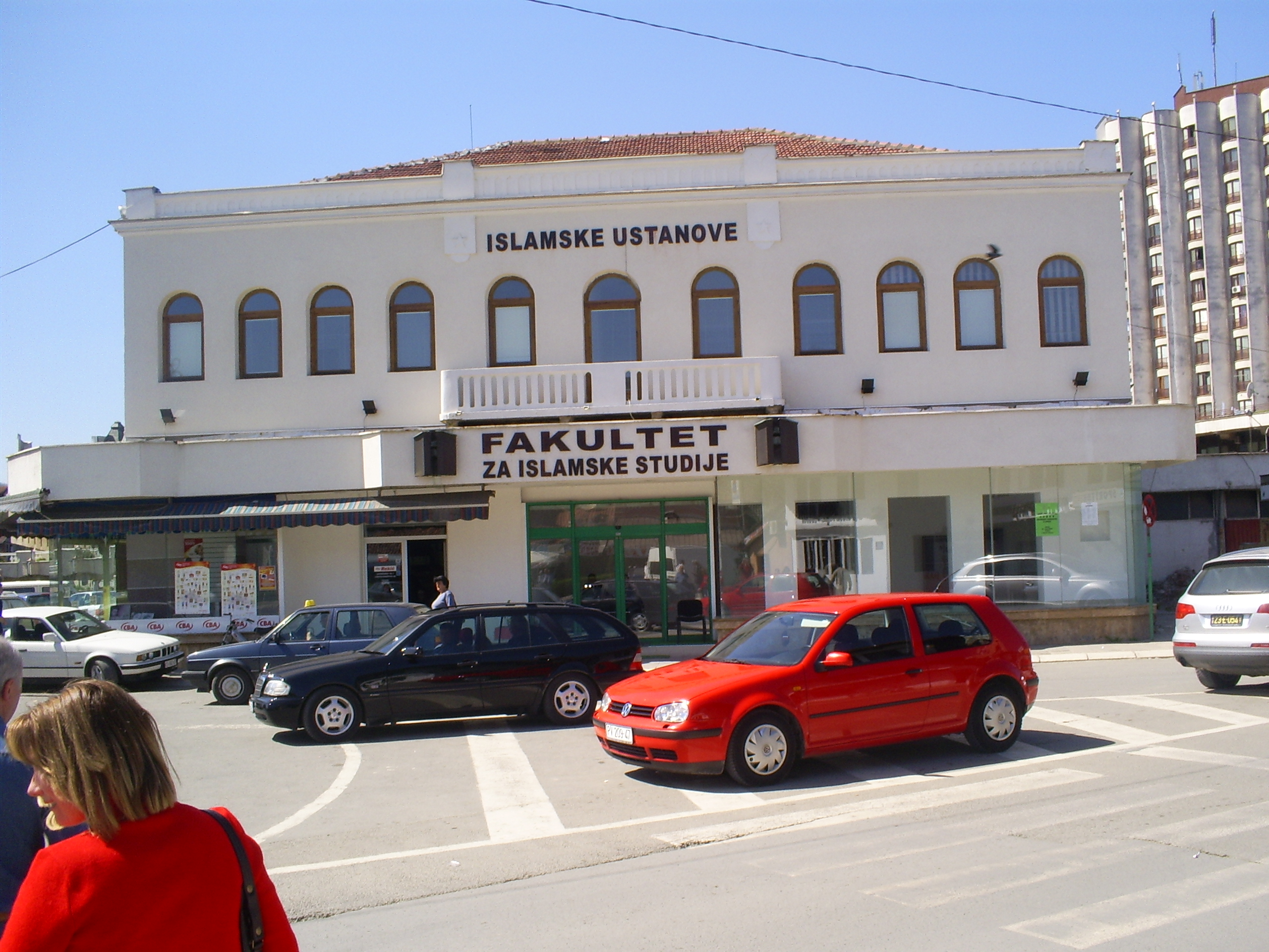 Fakultet za islamske studije u Novom Pazaru